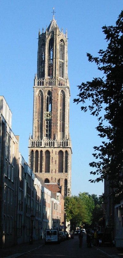 Utrecht, Domtoren, september 2003, gezien vanaf de Lange Nieuwstraat.